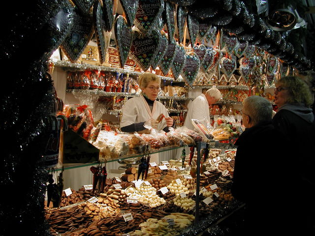 „Zuckerlstandl" am Wiener Christkindlmarkt Diese Datei wurde unter den Bedingungen der Creative Commons Attribution-ShareAlike License (abgekürzt „cc-by-sa“) in der Version 2.5 veröffentlicht. Creative Commons - Attribution-ShareAlike 2.5